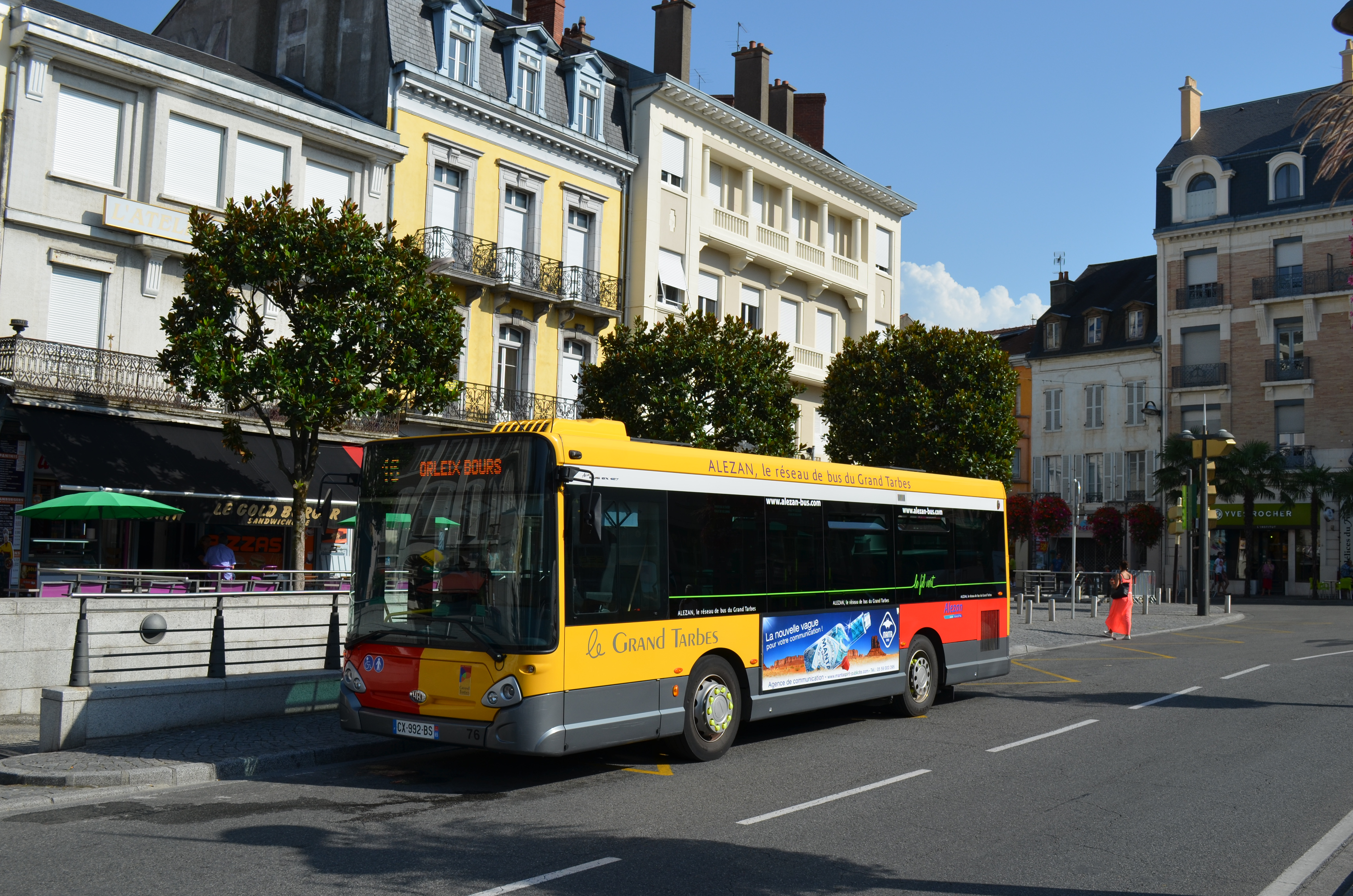 HeuliezBus GX 127 sur la ligne 16 à Tarbes Place Verdun.